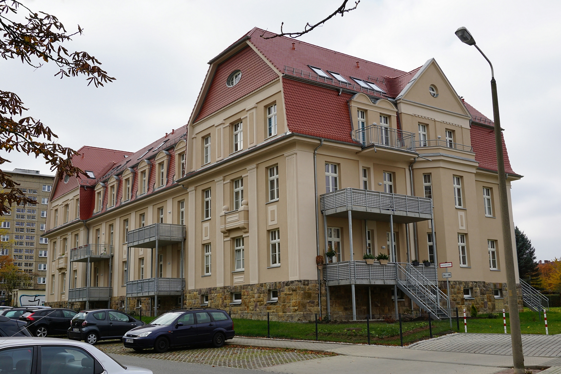 Chemnitz, ehemaliges Stabs- und Kasernenverwaltungsgebäude, III. Bataillon des Infanterieregimentes Nr. 104, Geibelstraße 214-218